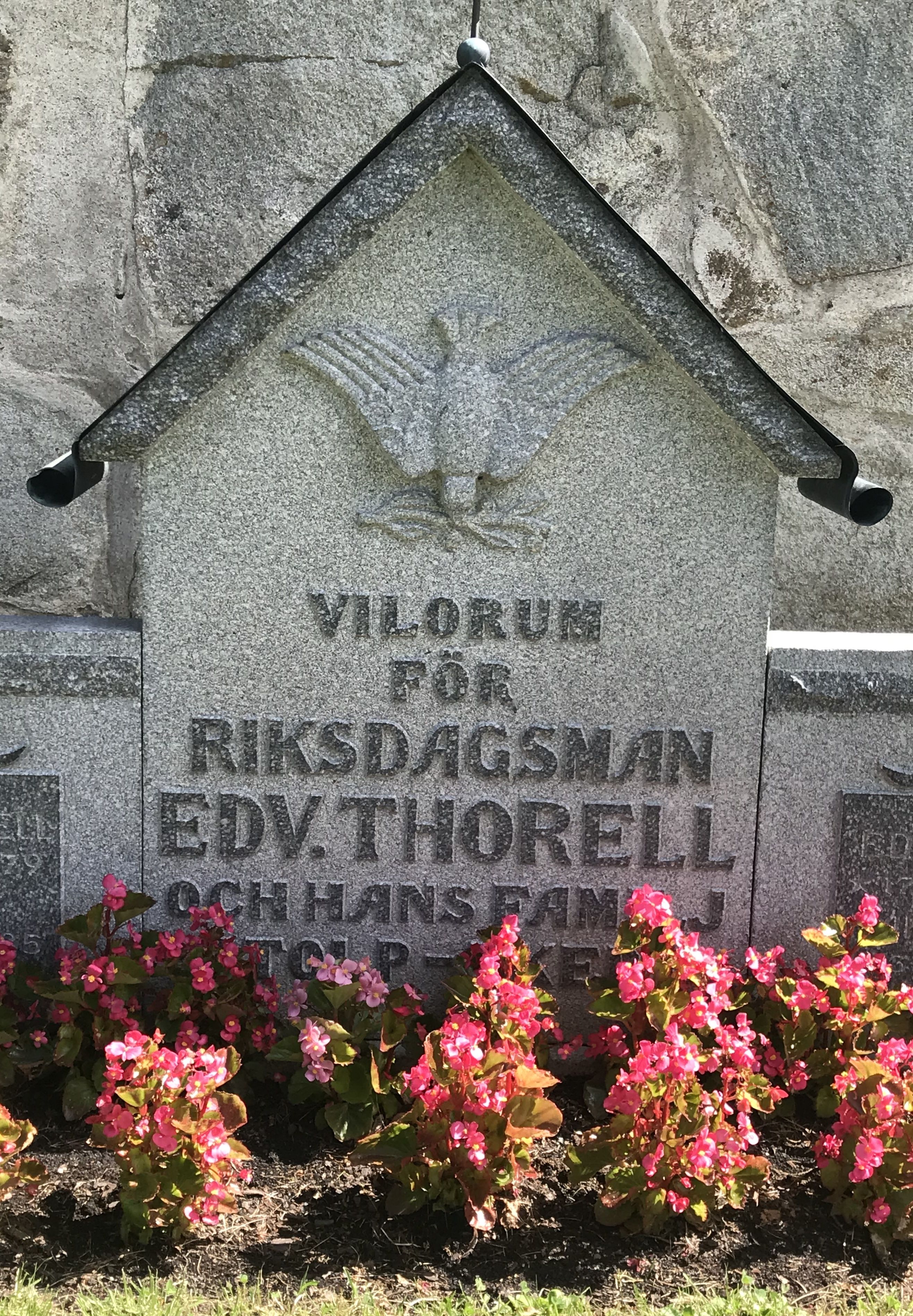 Frösunda kyrka